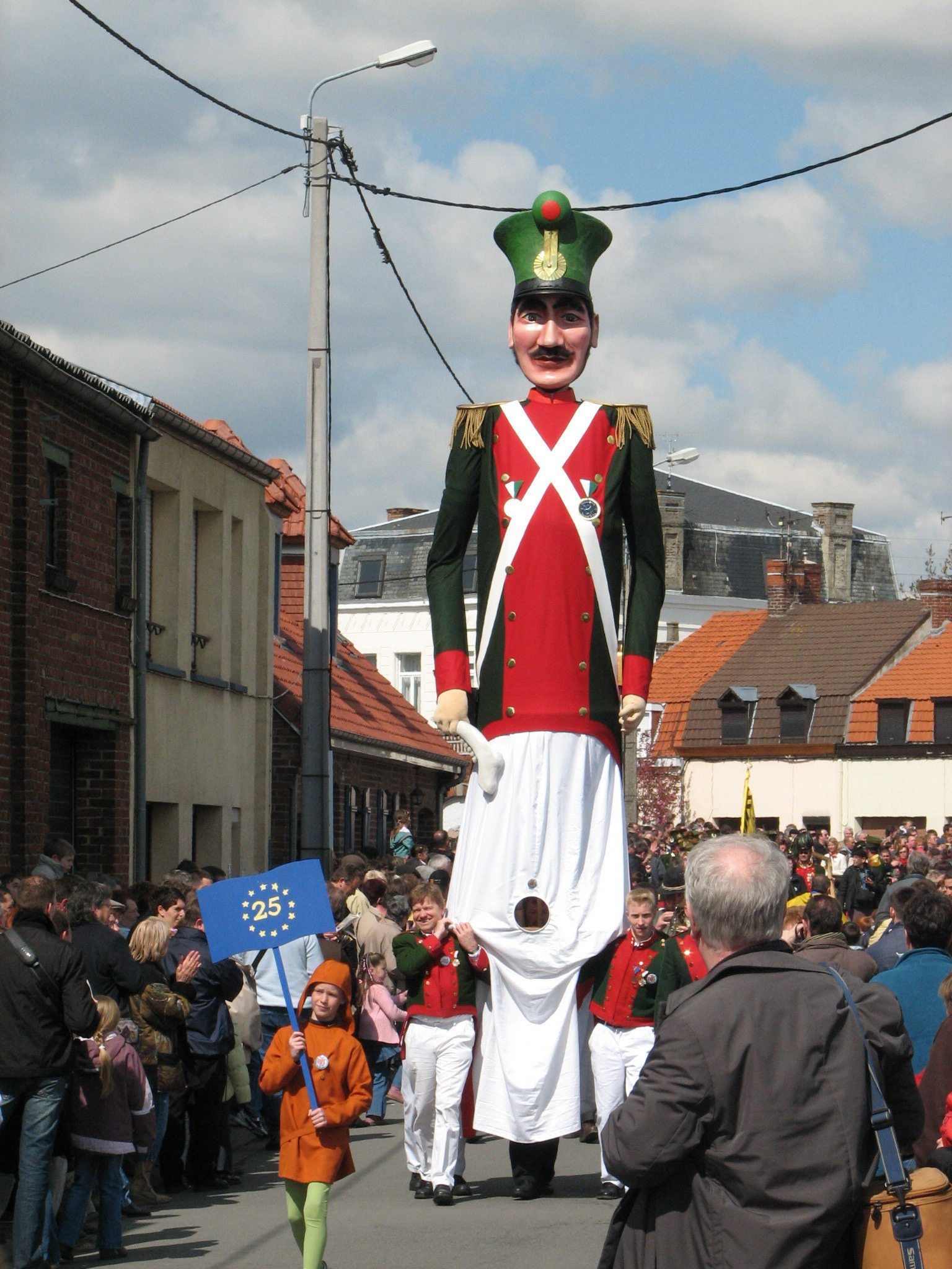 Samson de Murnau à Steenvoorde (rassemblement mondial de géants)